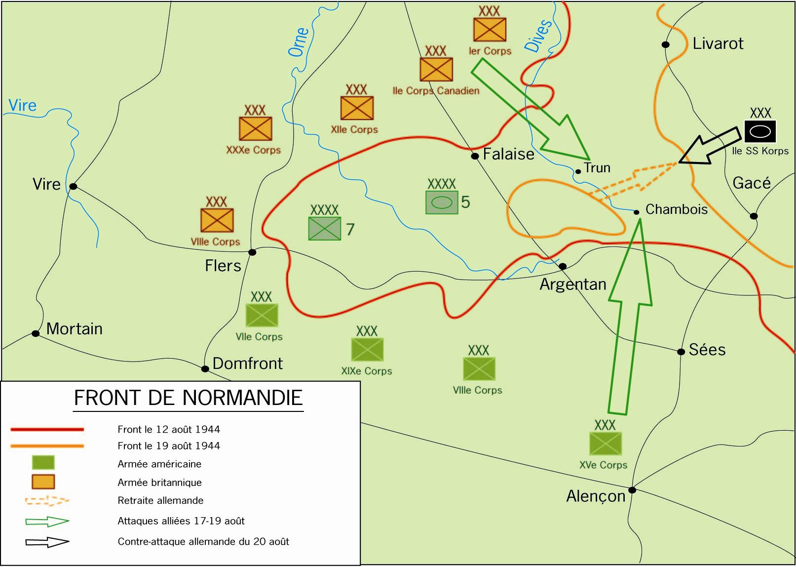 Carte de la bataille de la poche de Falaise